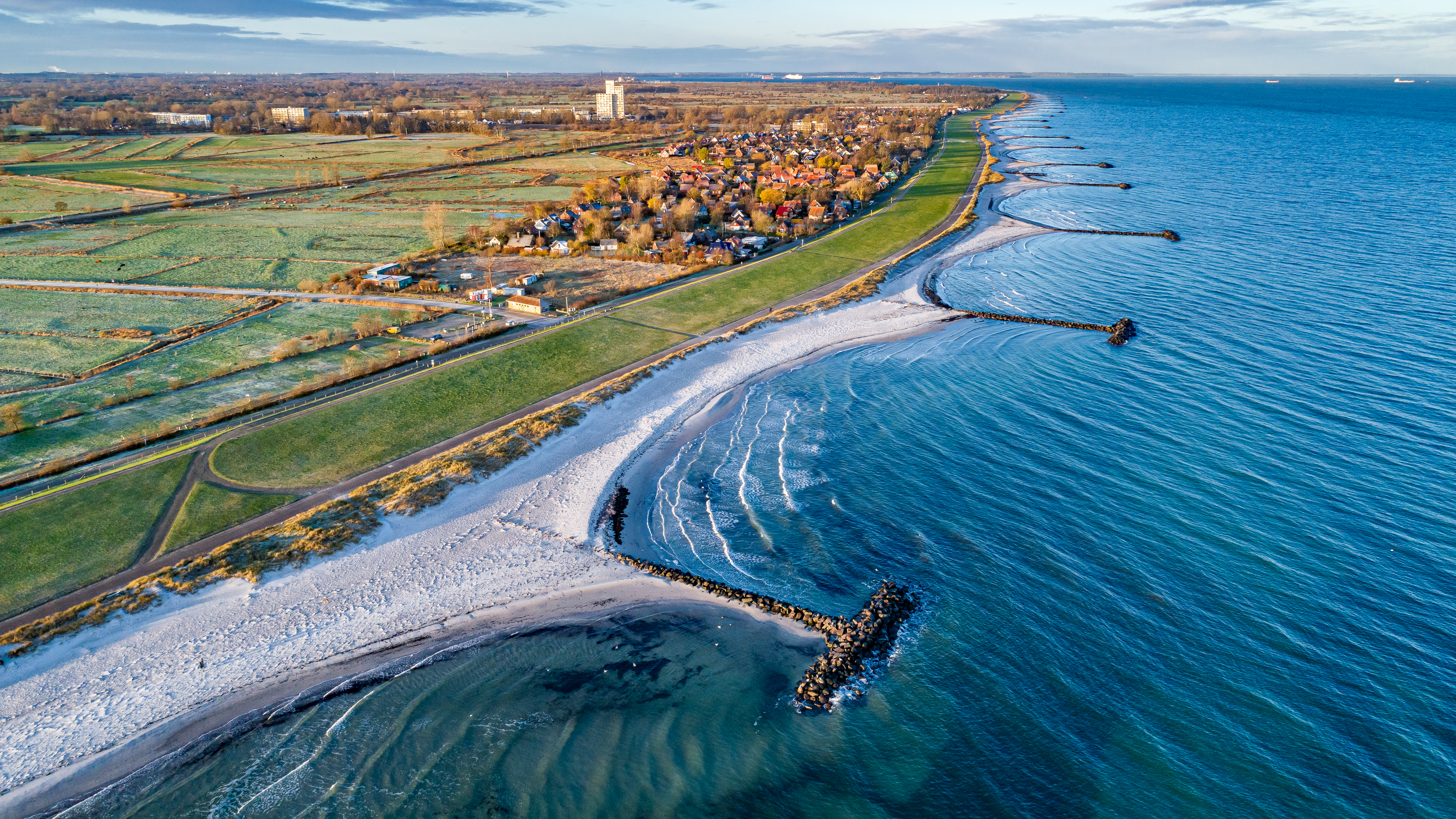 Schönberger Strand auf Höhe der Buhne 35, Brasilien und Kalifornien im oberen Bilddrittel, Blick Richtung Laboe.